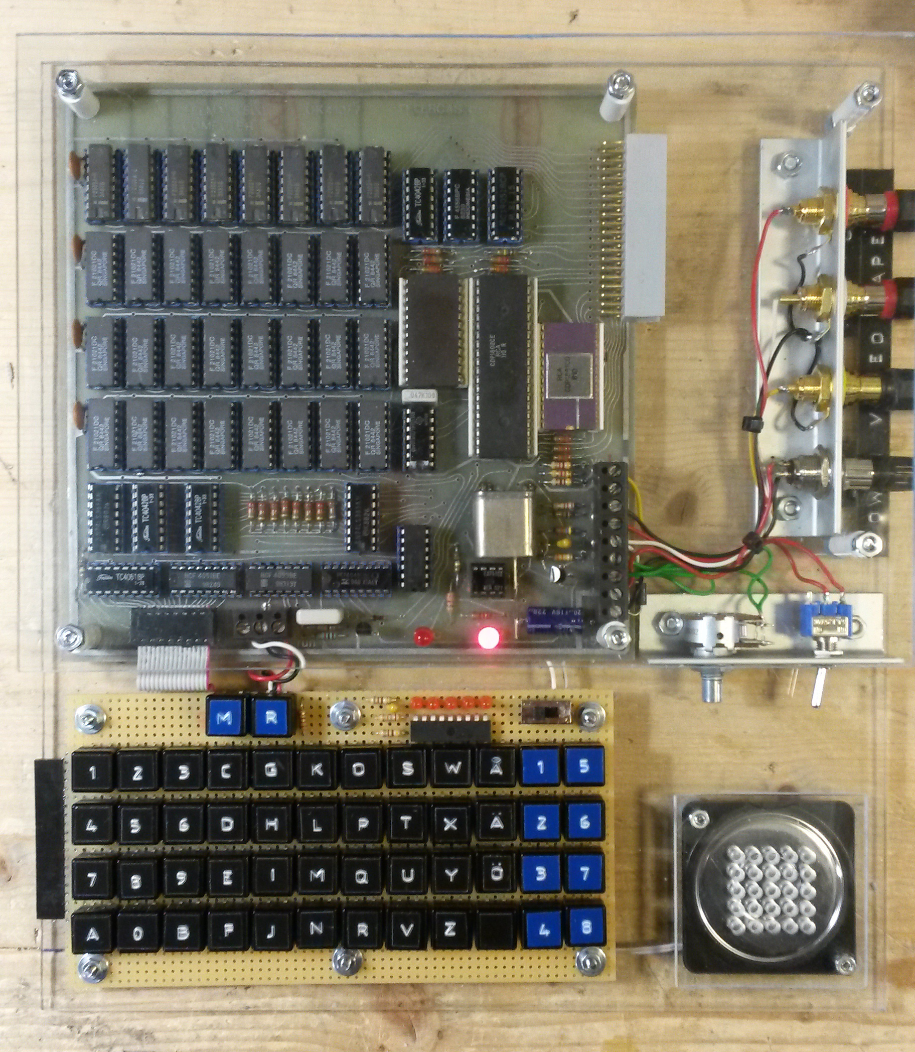 Telmac 1800 mikrotietokone